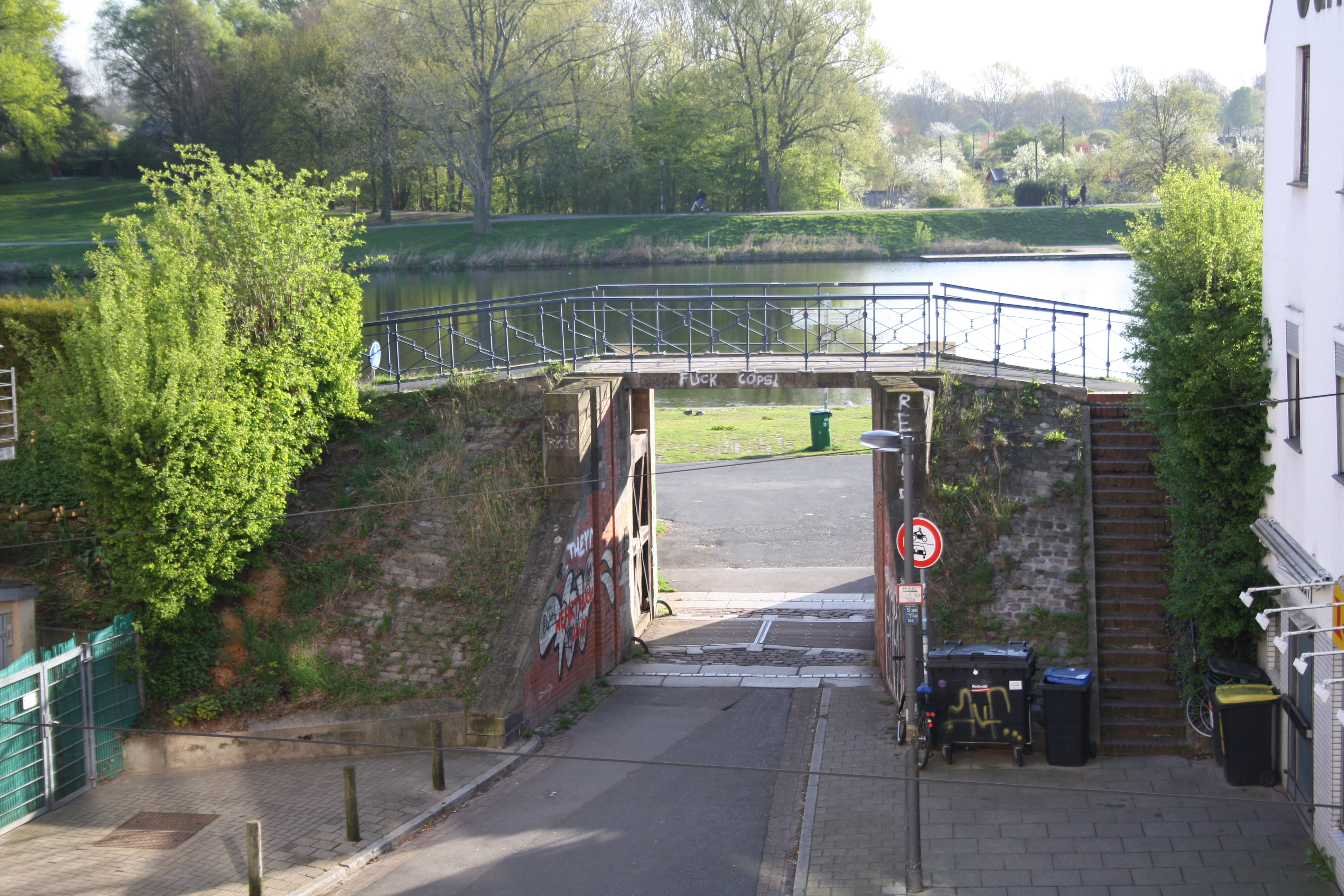 Deichschart am Habenhauser Deich zum Buntentorsteinweg mit Blick auf den Stadtwerder